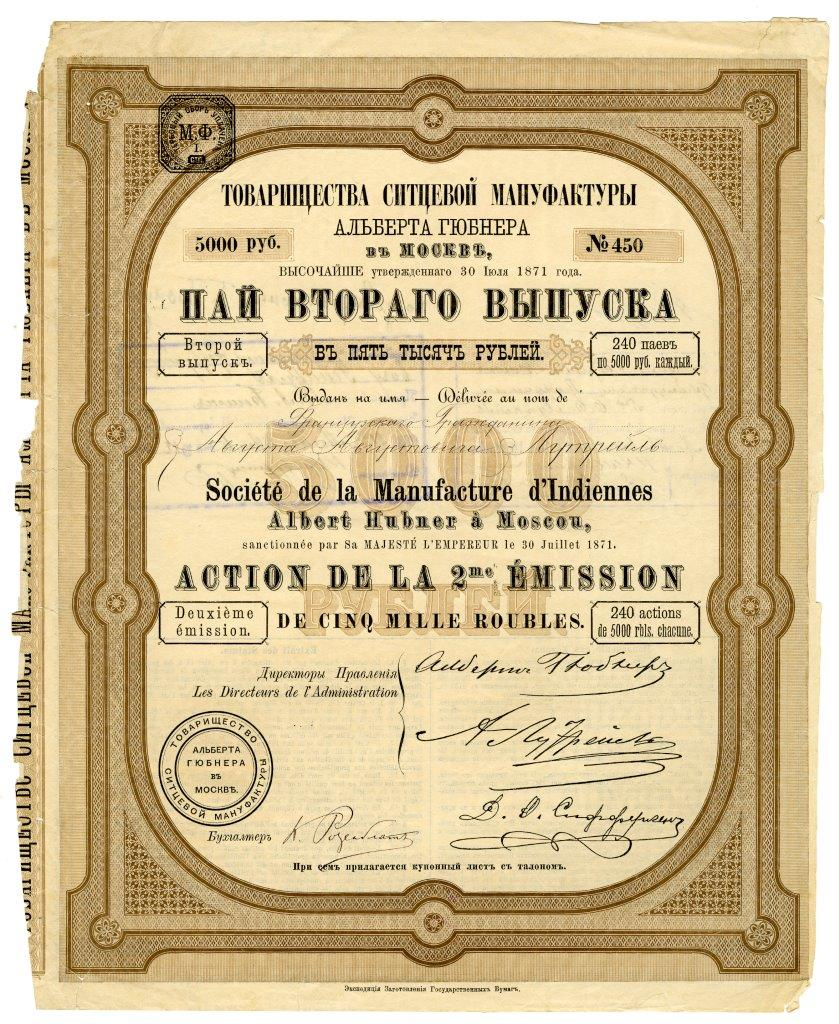 Пай второго выпуска в 5 тыс. руб., именной, Товарищества ситцевой мануфактуры Альберта Гюбнера в Москве.